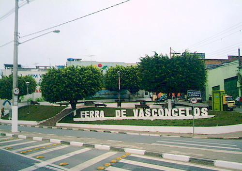 Portal de entrada de Ferraz de Vasconcelos